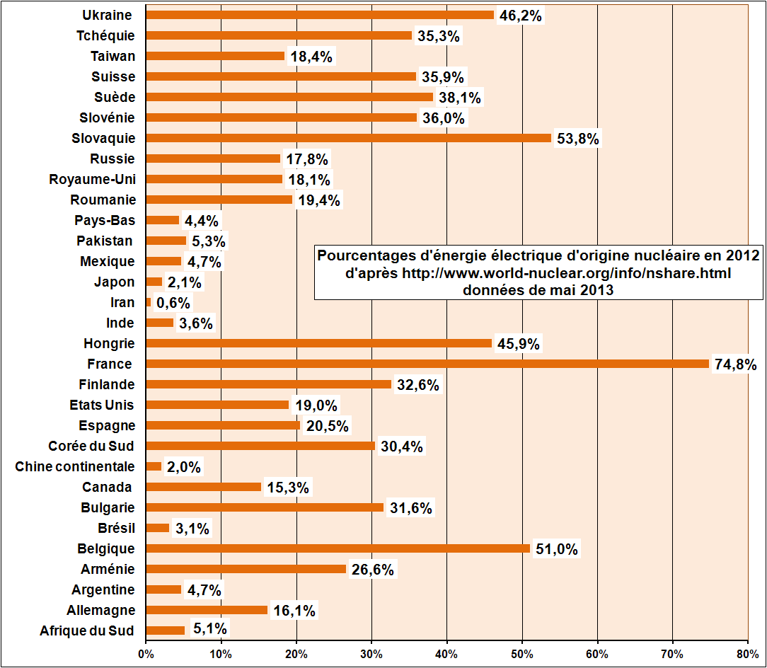 Pourcentage électricité origine nucléaire en 2010 données